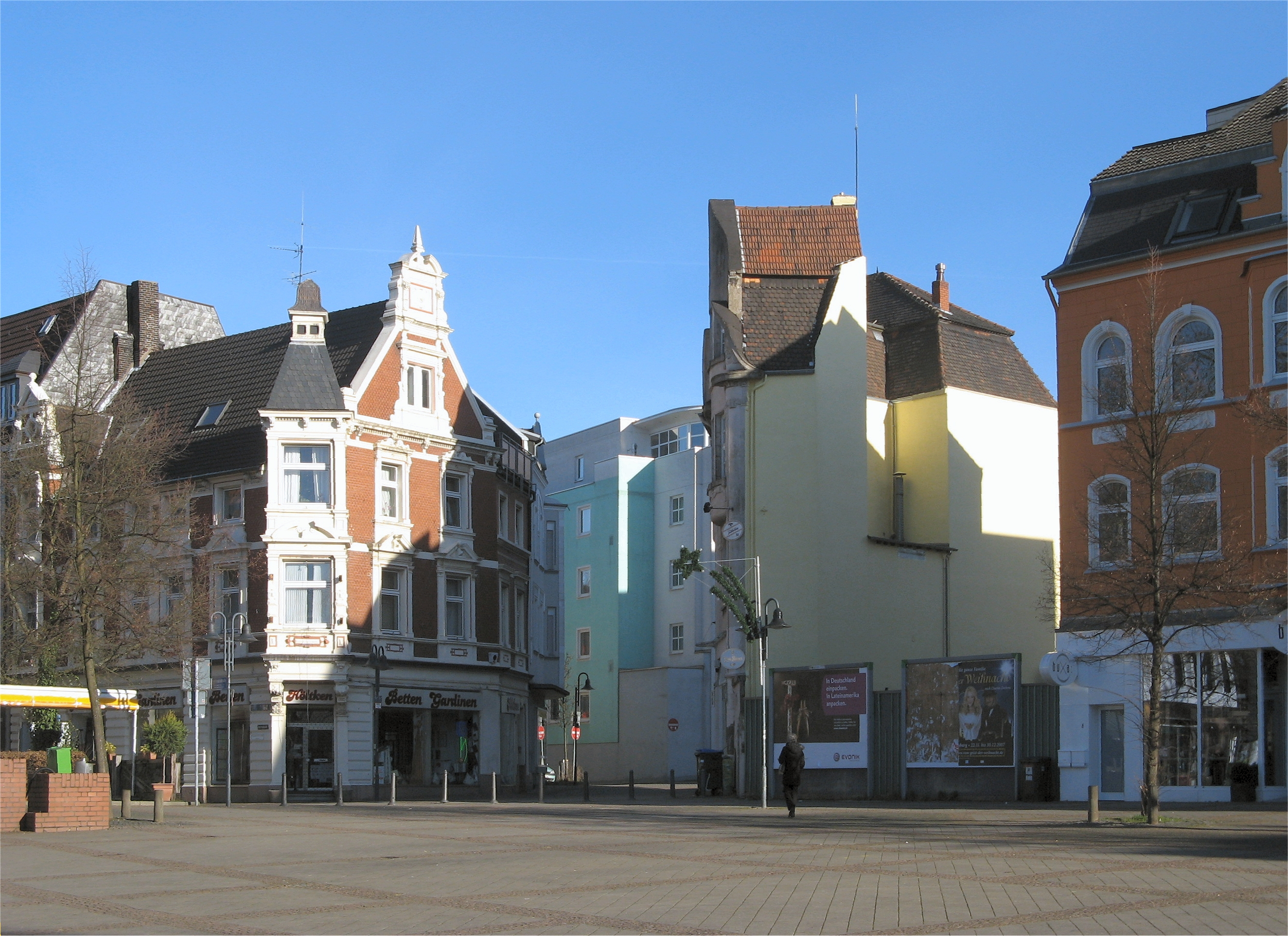 Wattenscheid, Old Market Square (Alter Markt)